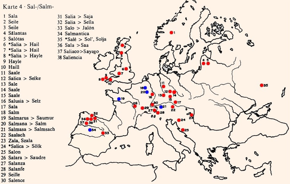 Krahe Rooth *Sal-, *Salm. Old European map